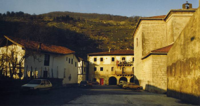 Albizturko plaza, 1988. urtean.